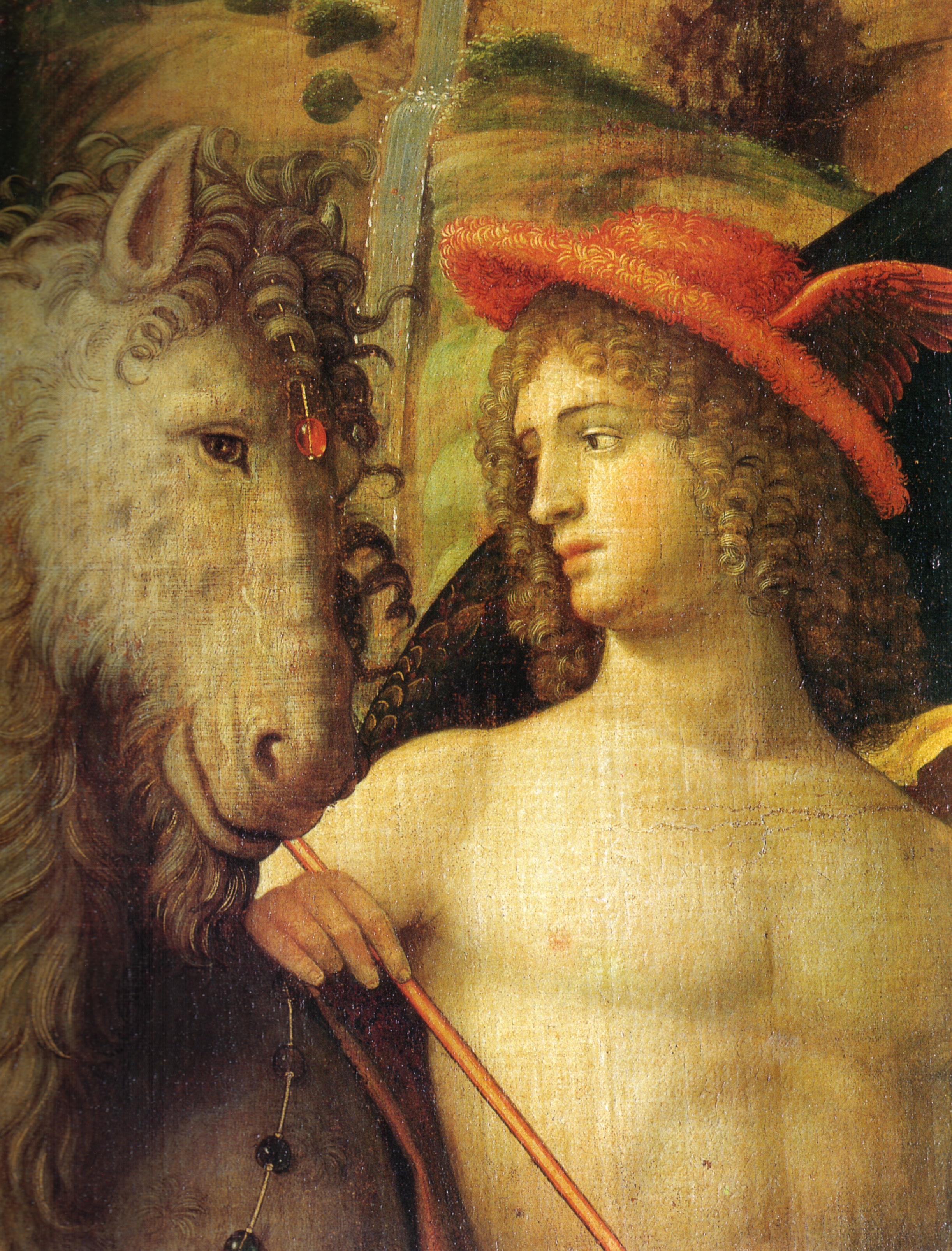 Mantegna, parnaso dettaglio 01.jpg